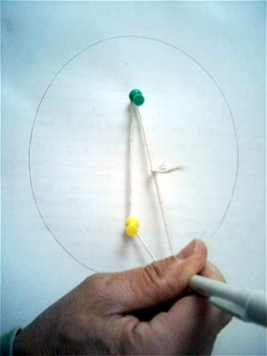 PD